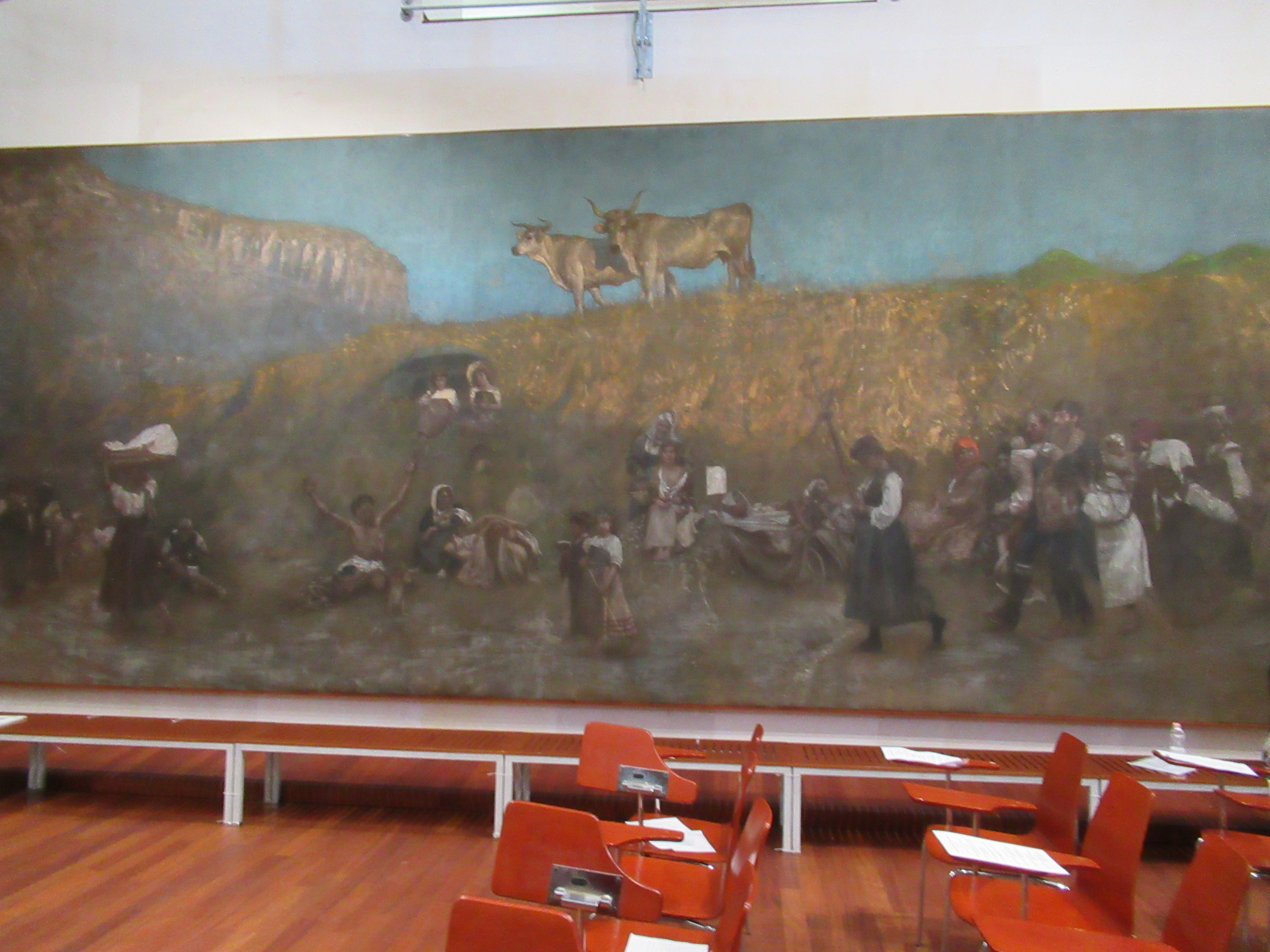 1900 giugno 2018 MUseo MIchetti Pellegrinaggio a Casalbordino (gli Storpi) di Francesco Paolo Michetti (1900)